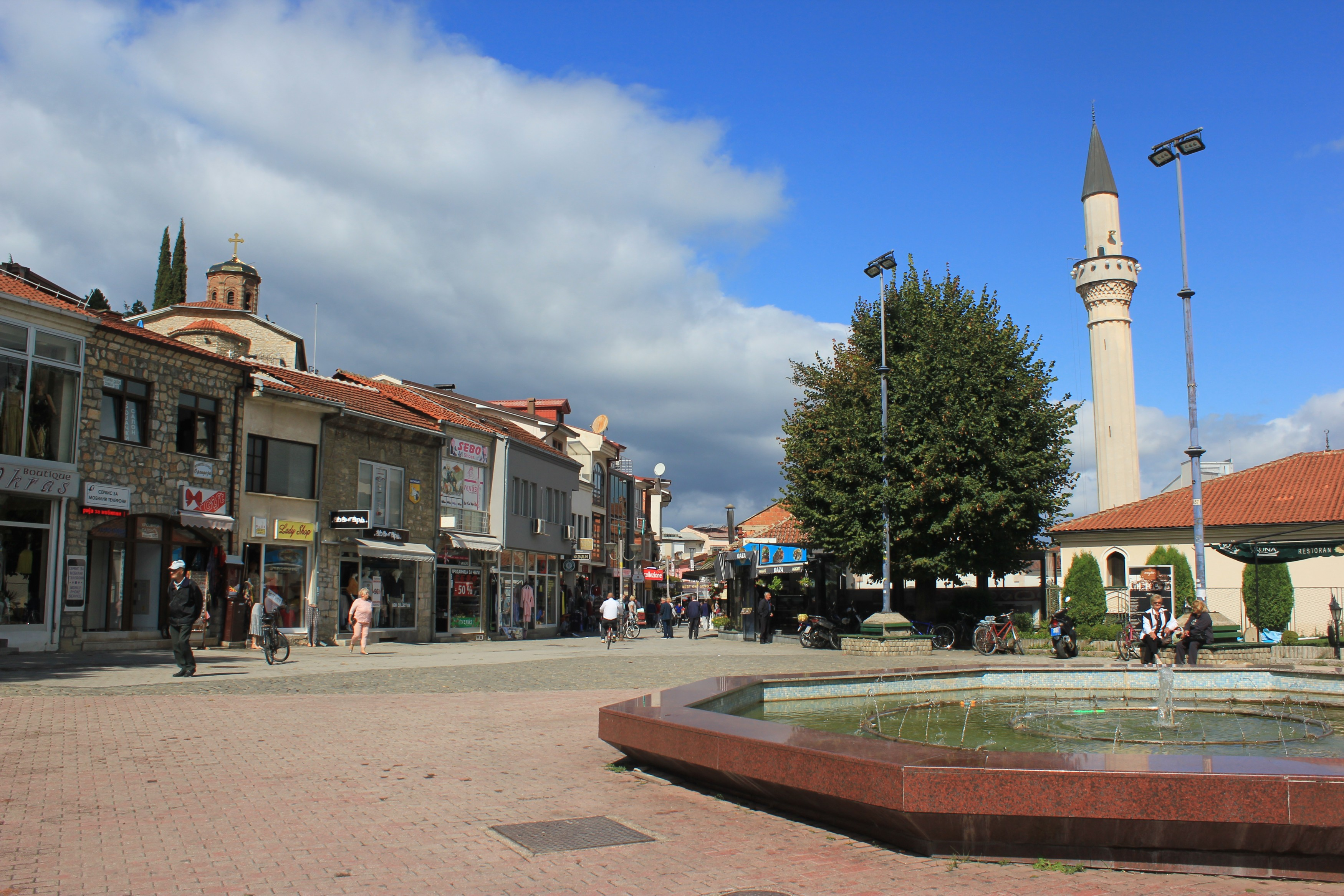 Der Çınar in Ohrid.